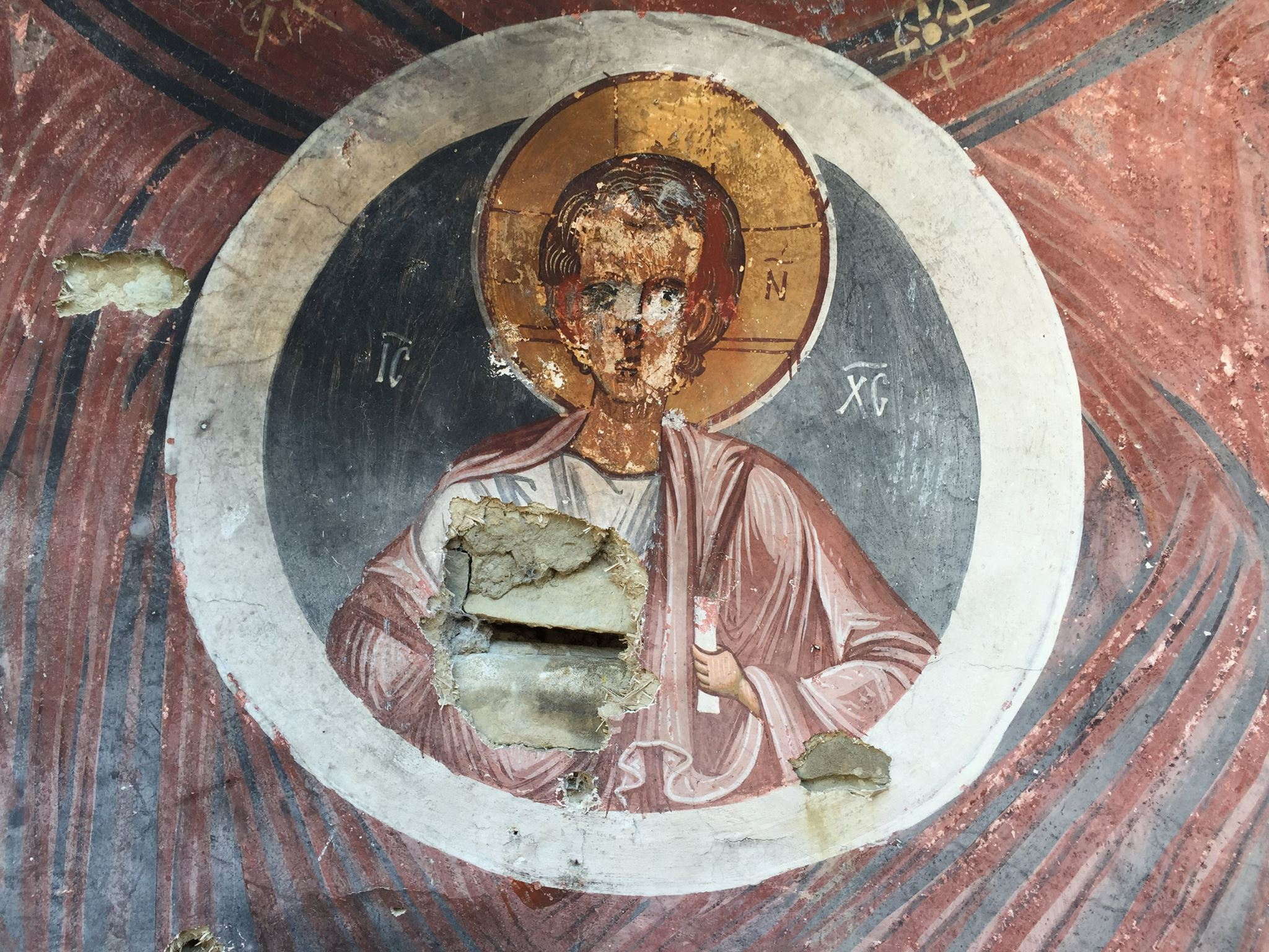 Фреска на Исус Христос во црквата во село Убого, неготинско